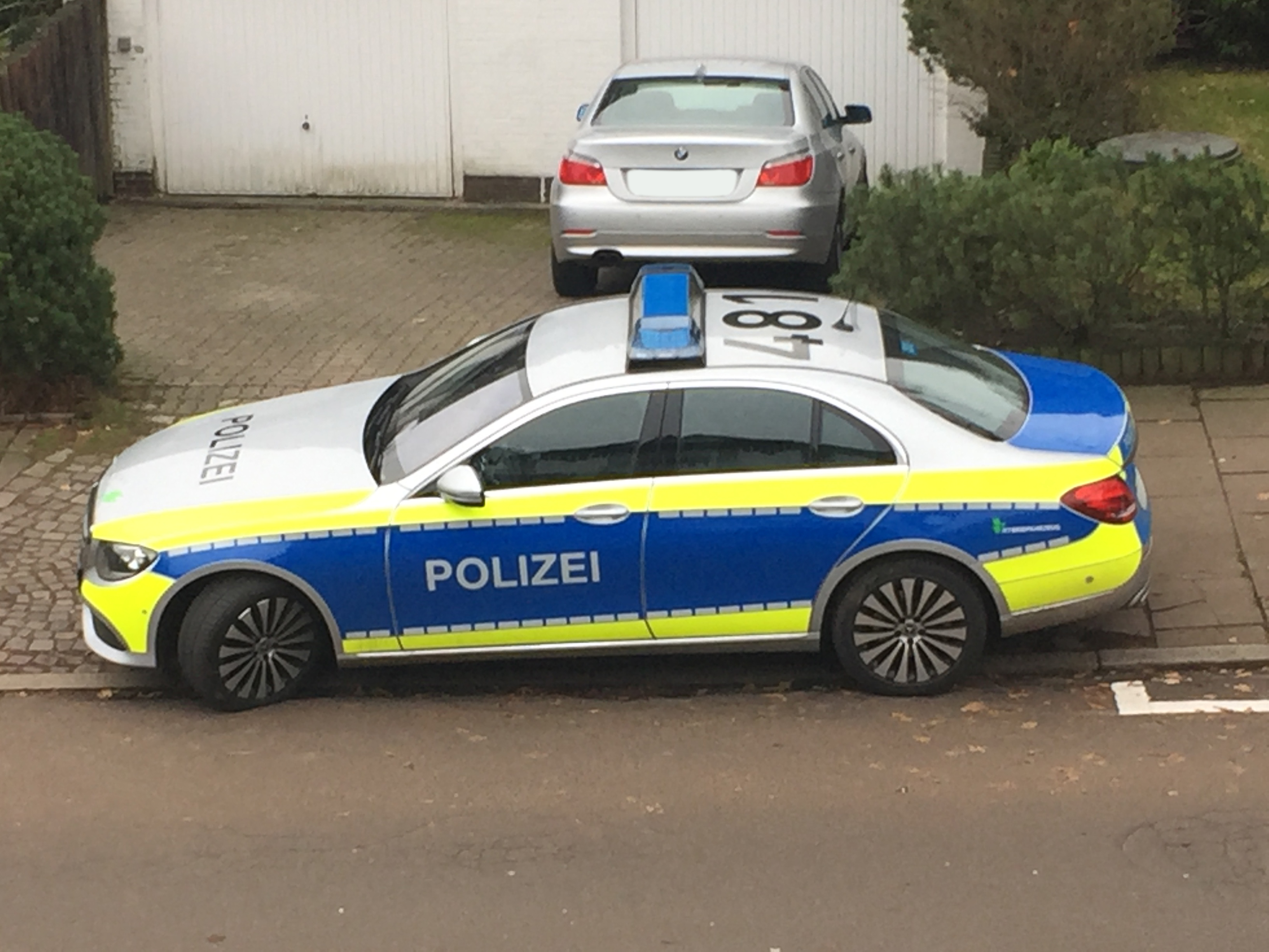 Streifenwagen der Polizei Hamburg (Mercedes-Benz S213)